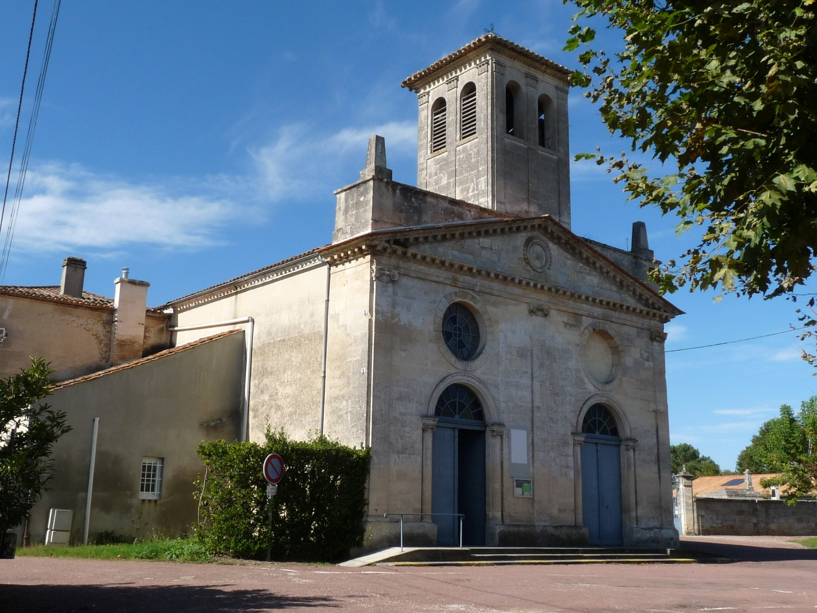 Eglise de Cavignac, Gironde, France